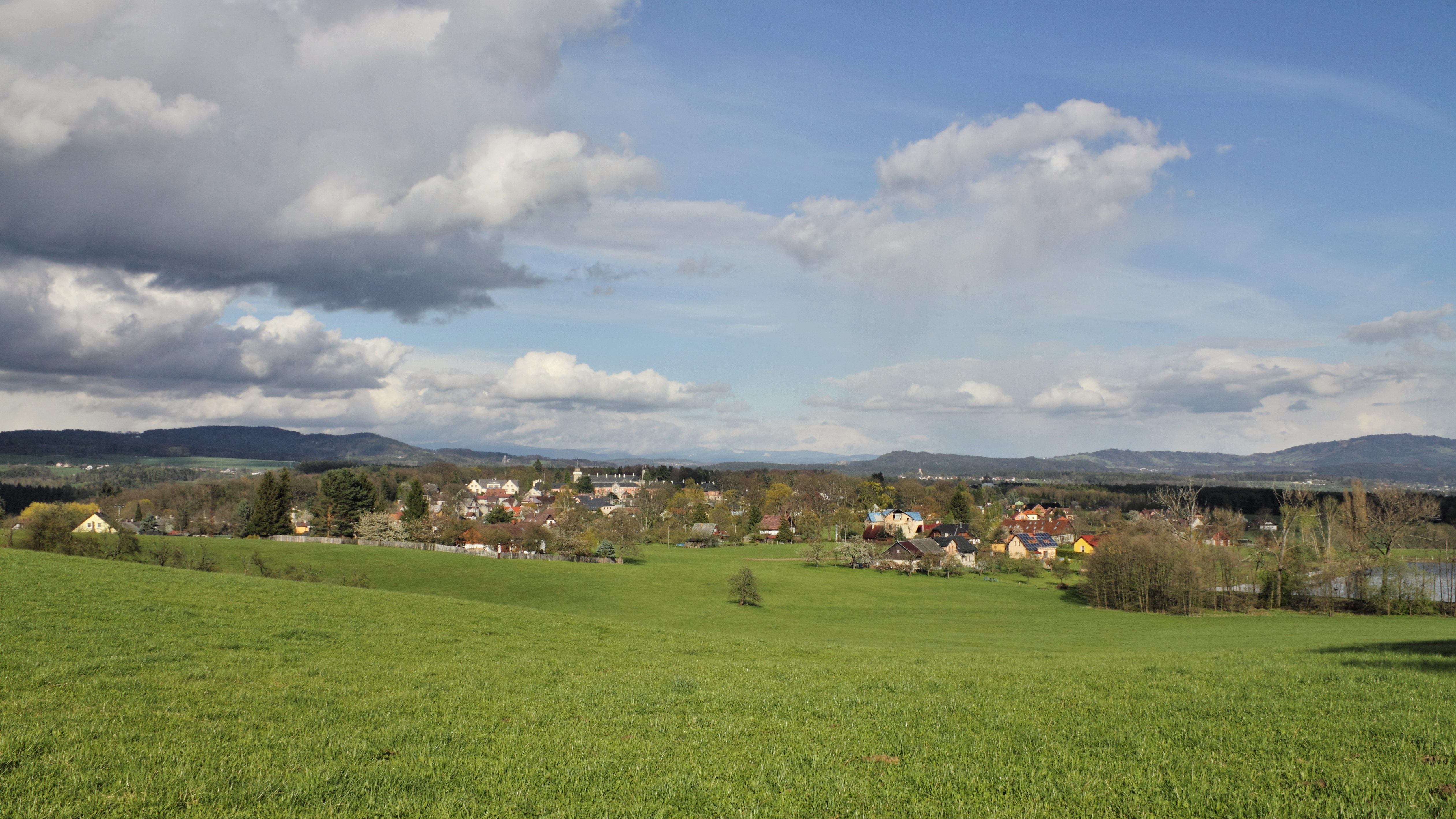 Radimovice se zámkem Sychrov, na horizontu vrcholky Krkonoš